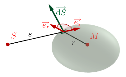 Illustration de la démonstration de la formule de diffraction de Kirchhoff